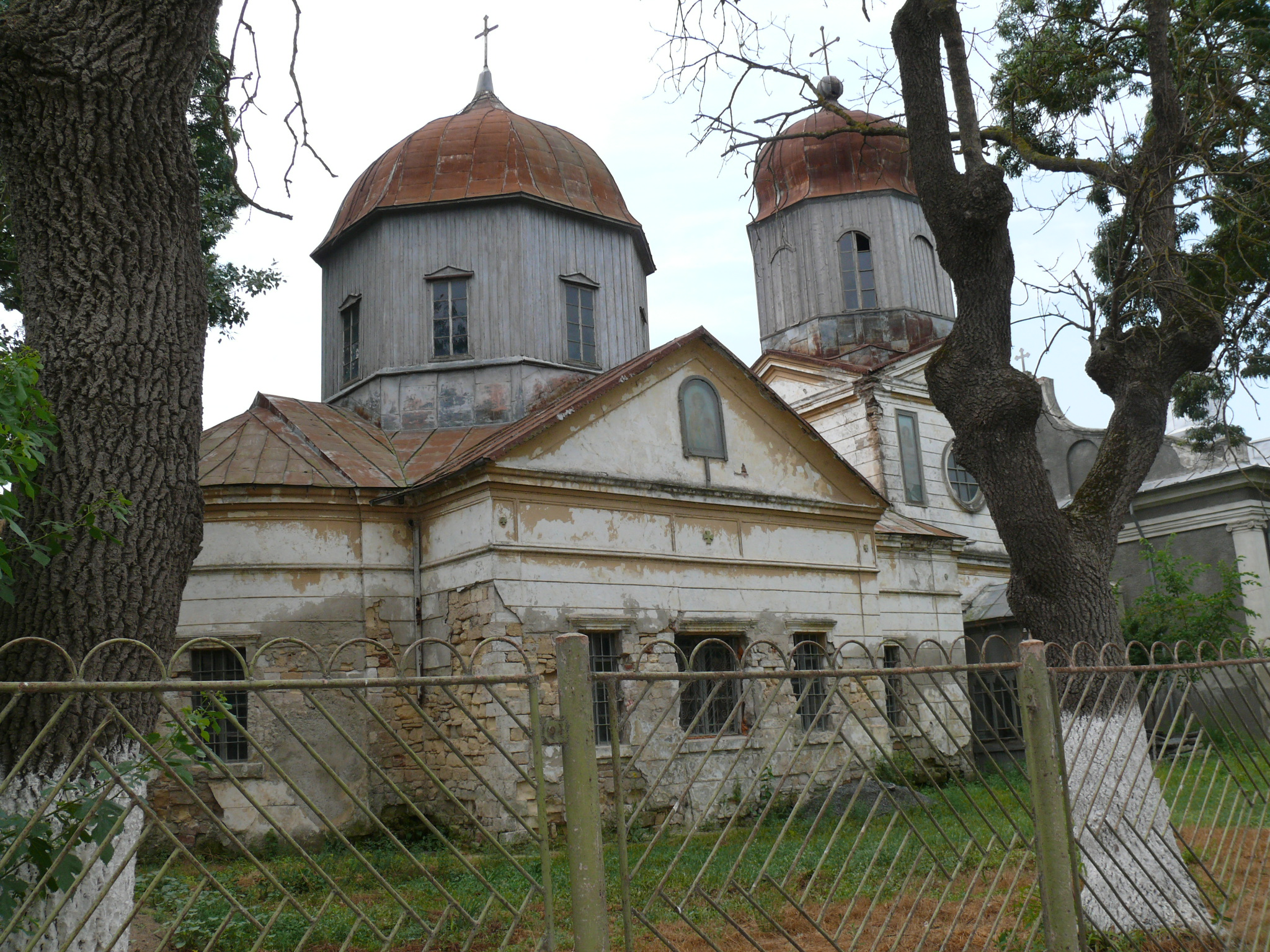 Biserica ortodoxă "Sf. Nicolae"